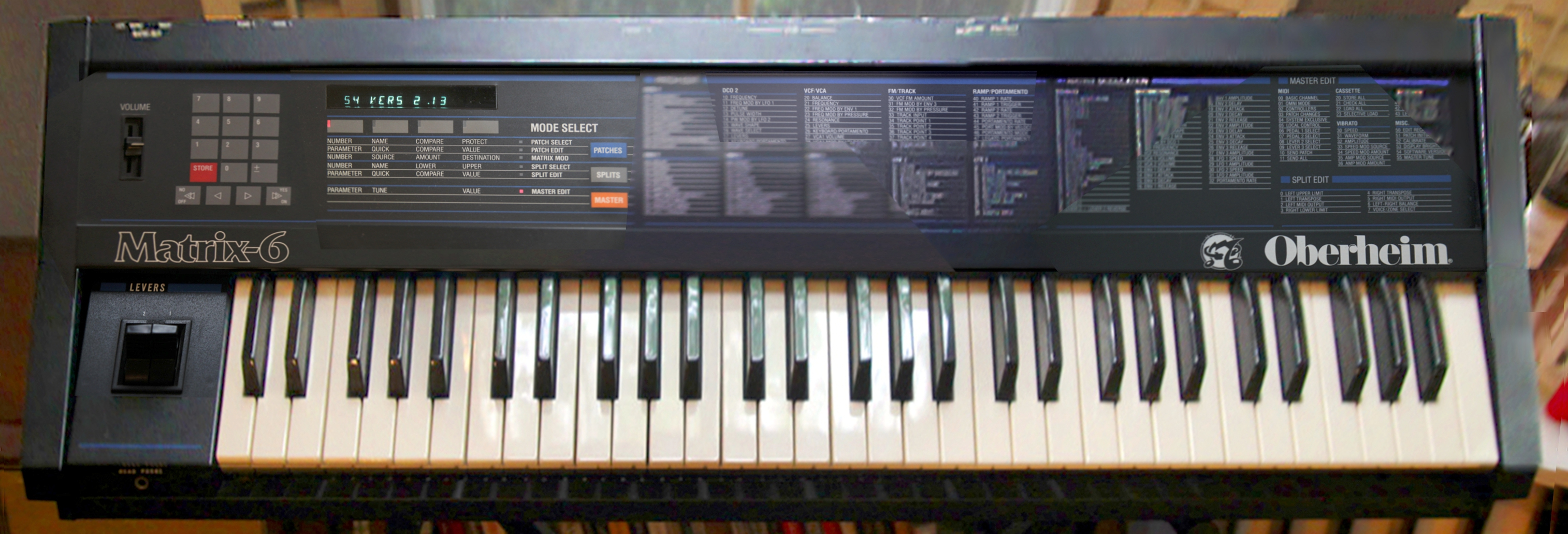 Oberheim Matrix-6